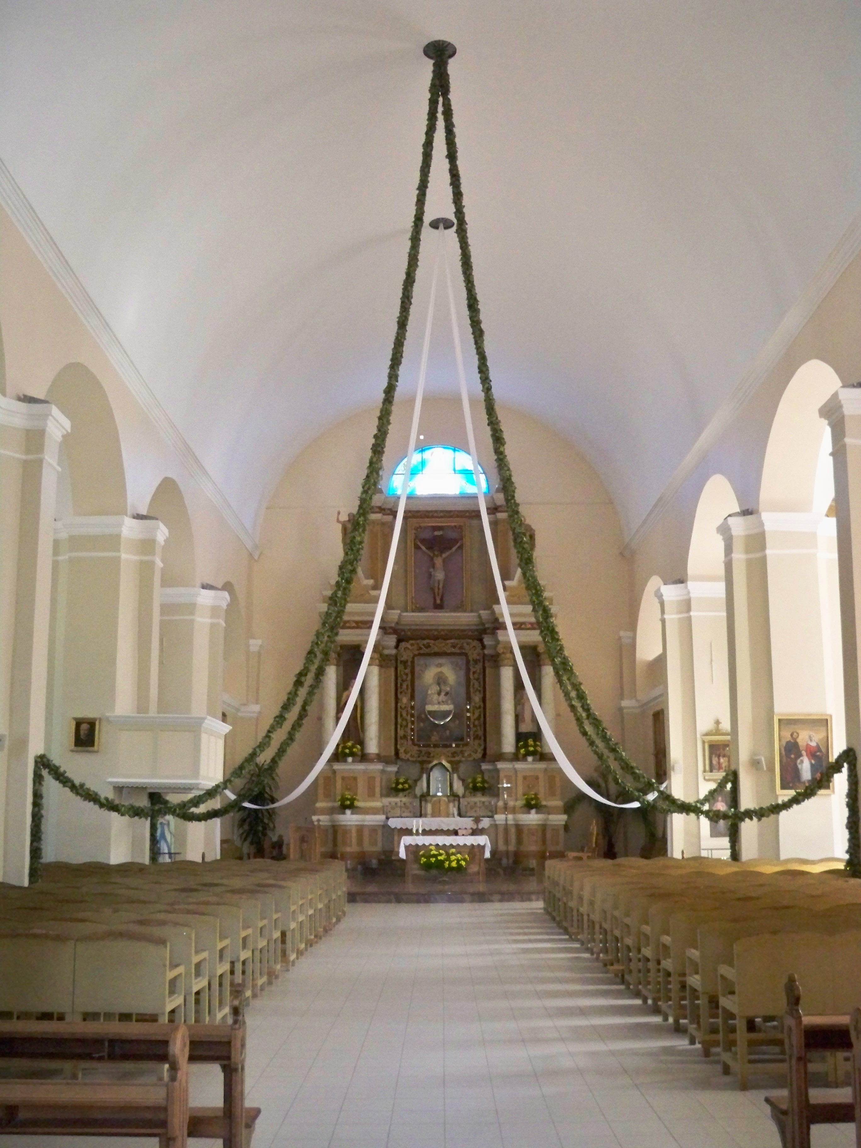 Bažnyčia Zarasuos per Žolinę.